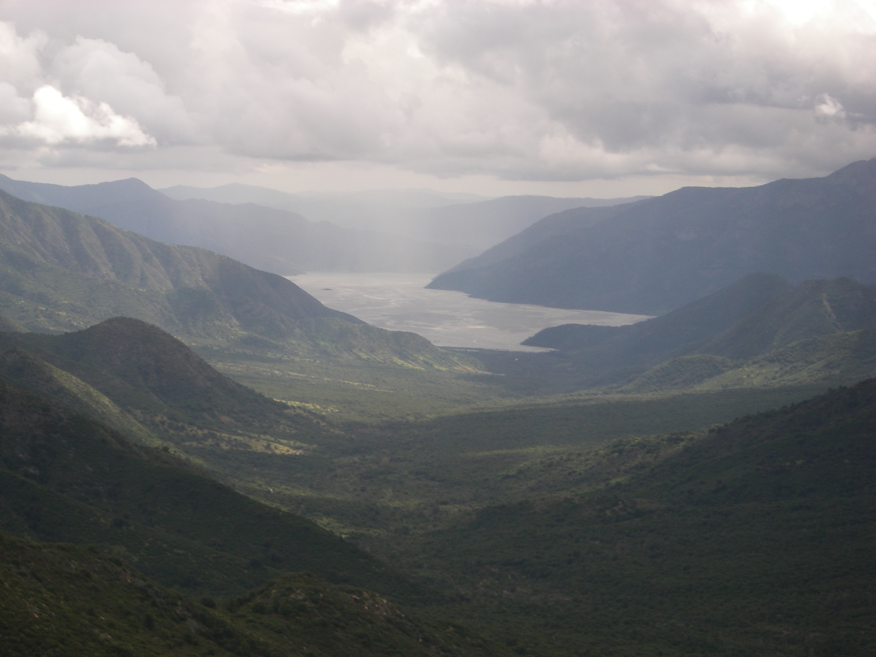 Embalse Carén.